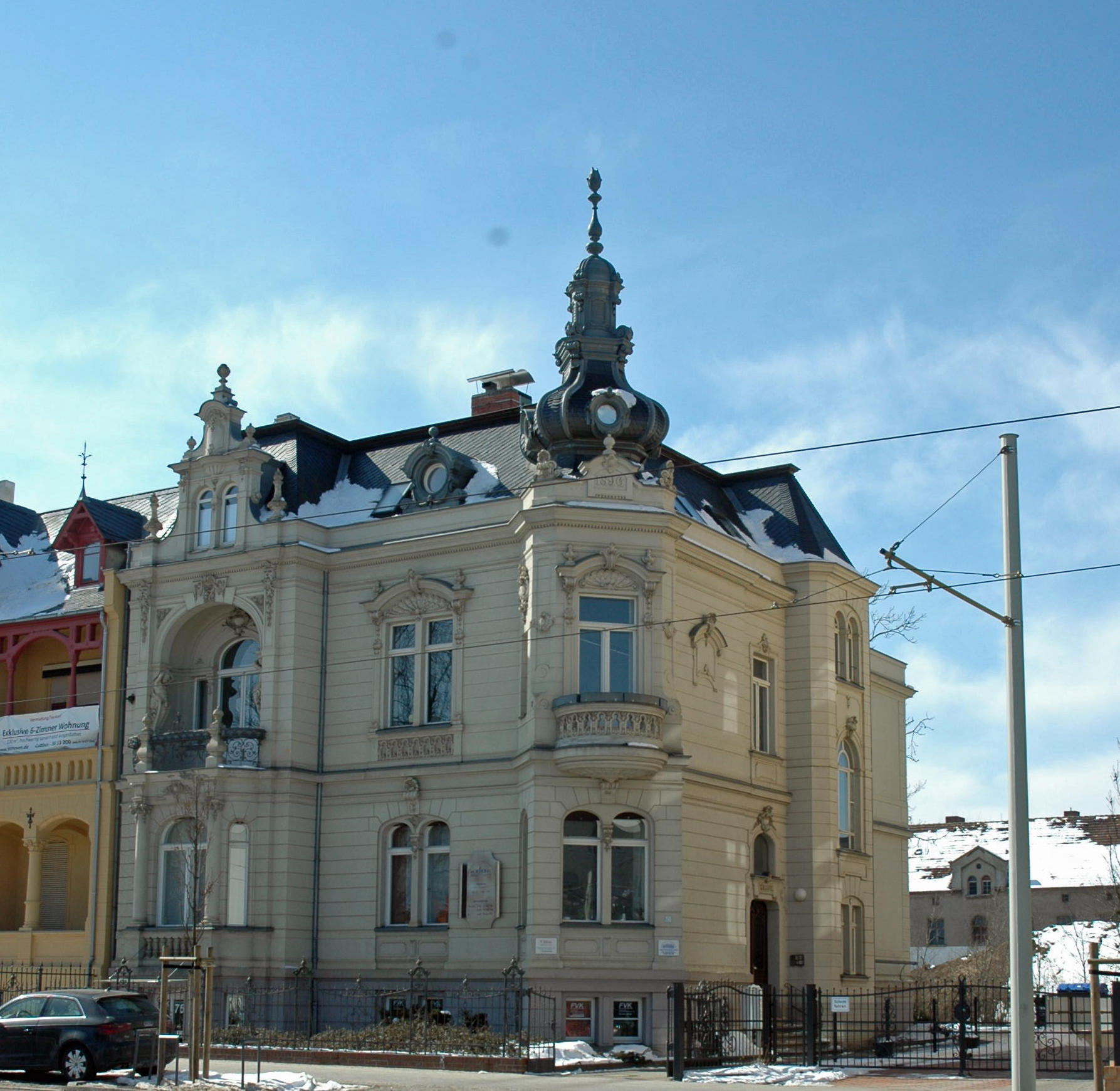 Bahnhofstraße 76